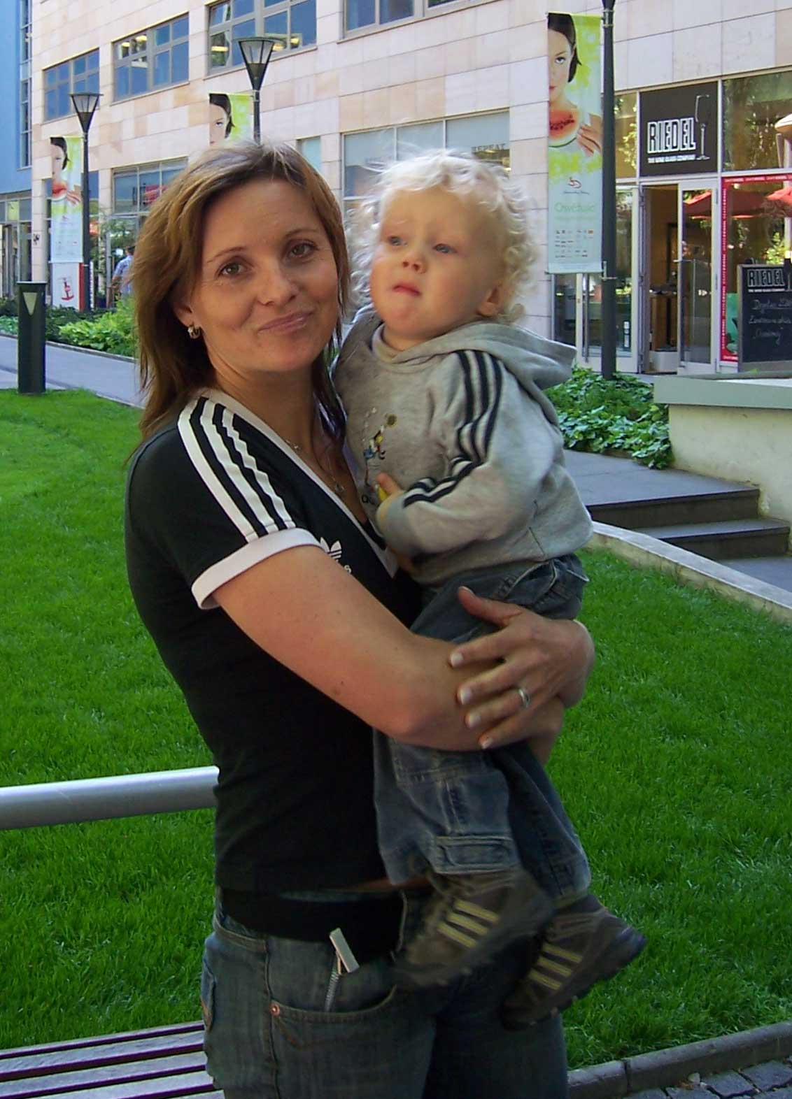 Ludmila Formanová s dítětem